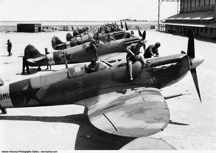 هواپیمایی انگلیسی اسپیت‌فایر در آبادان